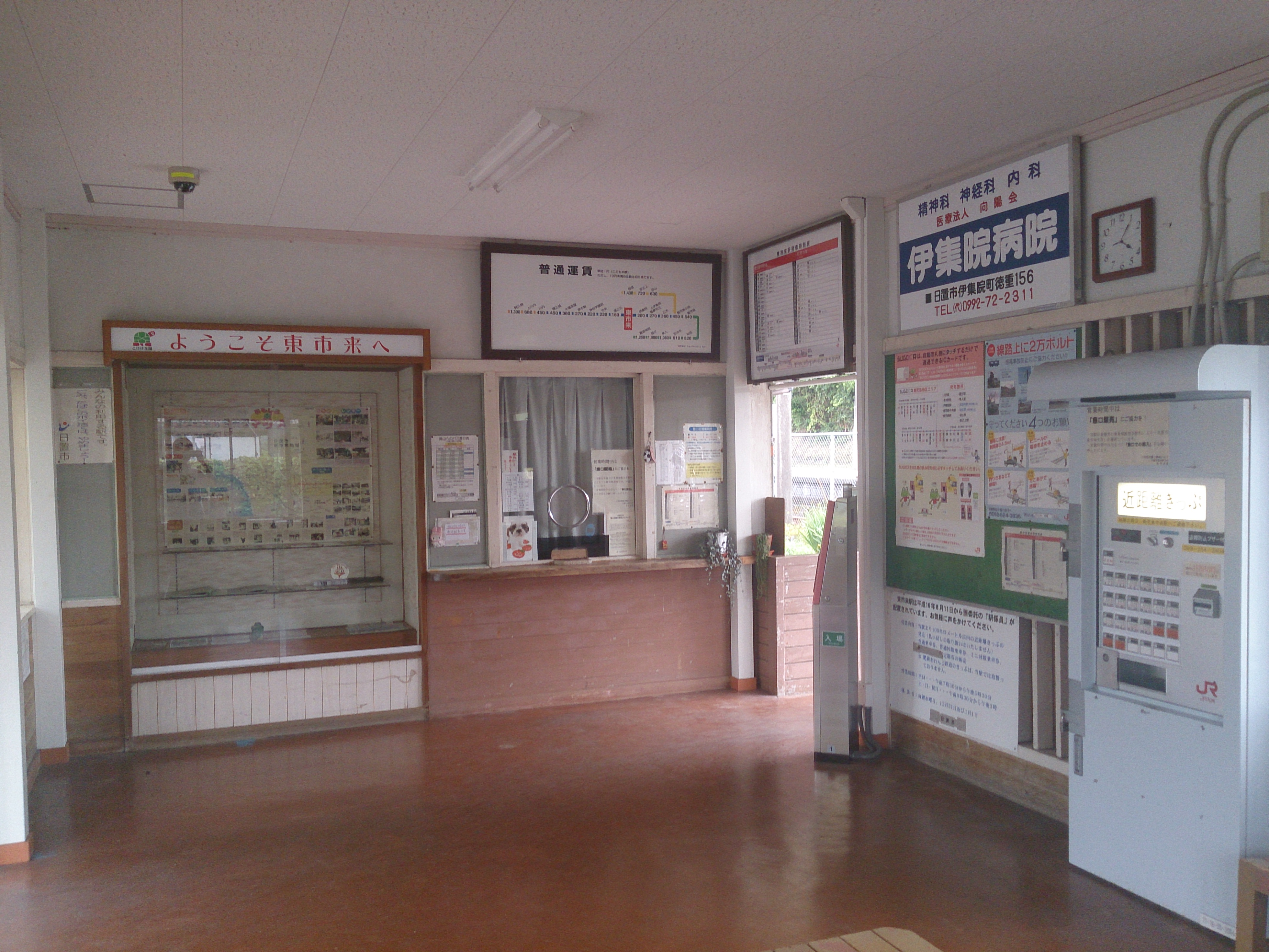 東市来駅駅舎内